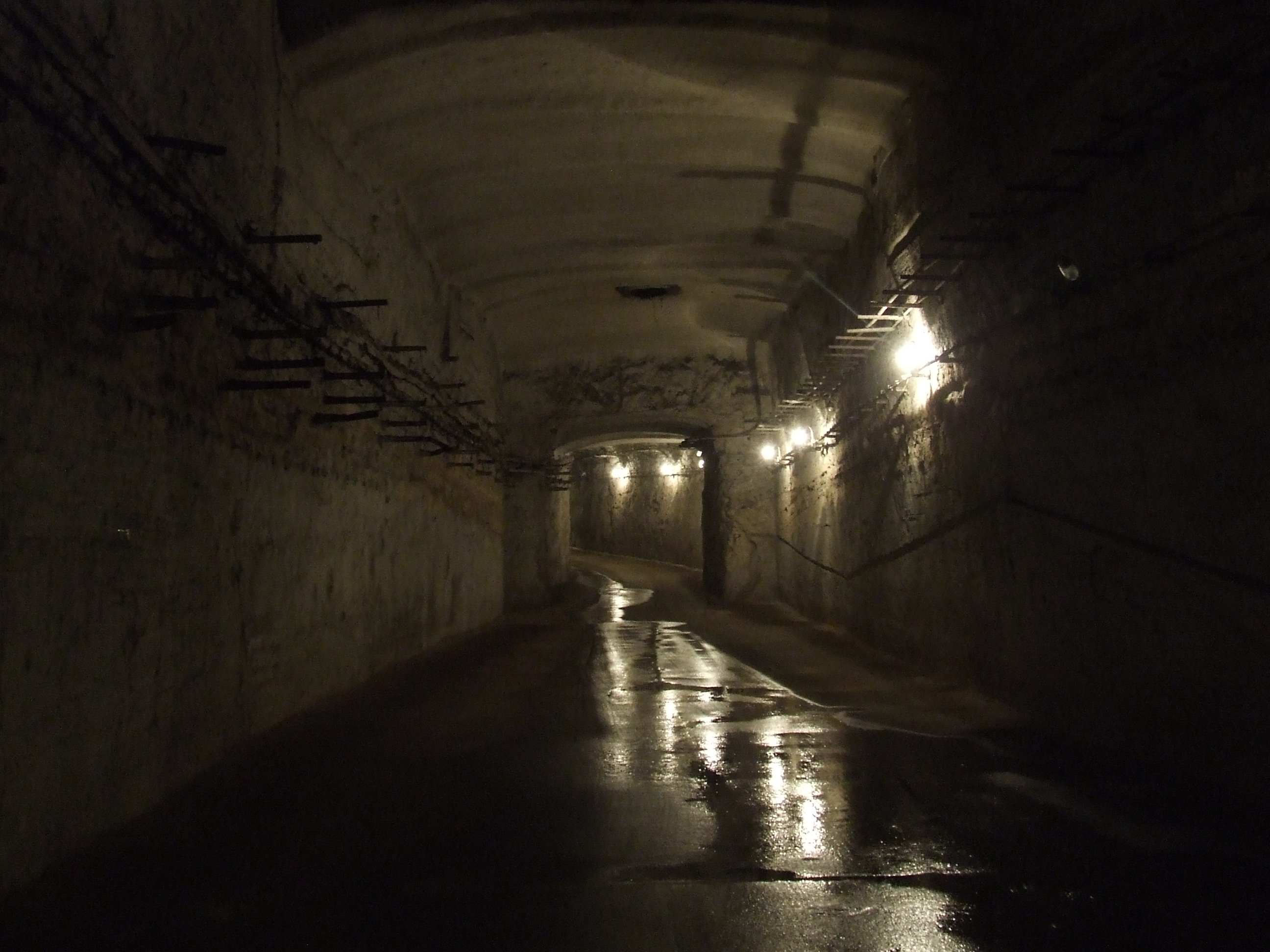 Kőbányai pincerendszer Kőbánya, Havas Ignác utca